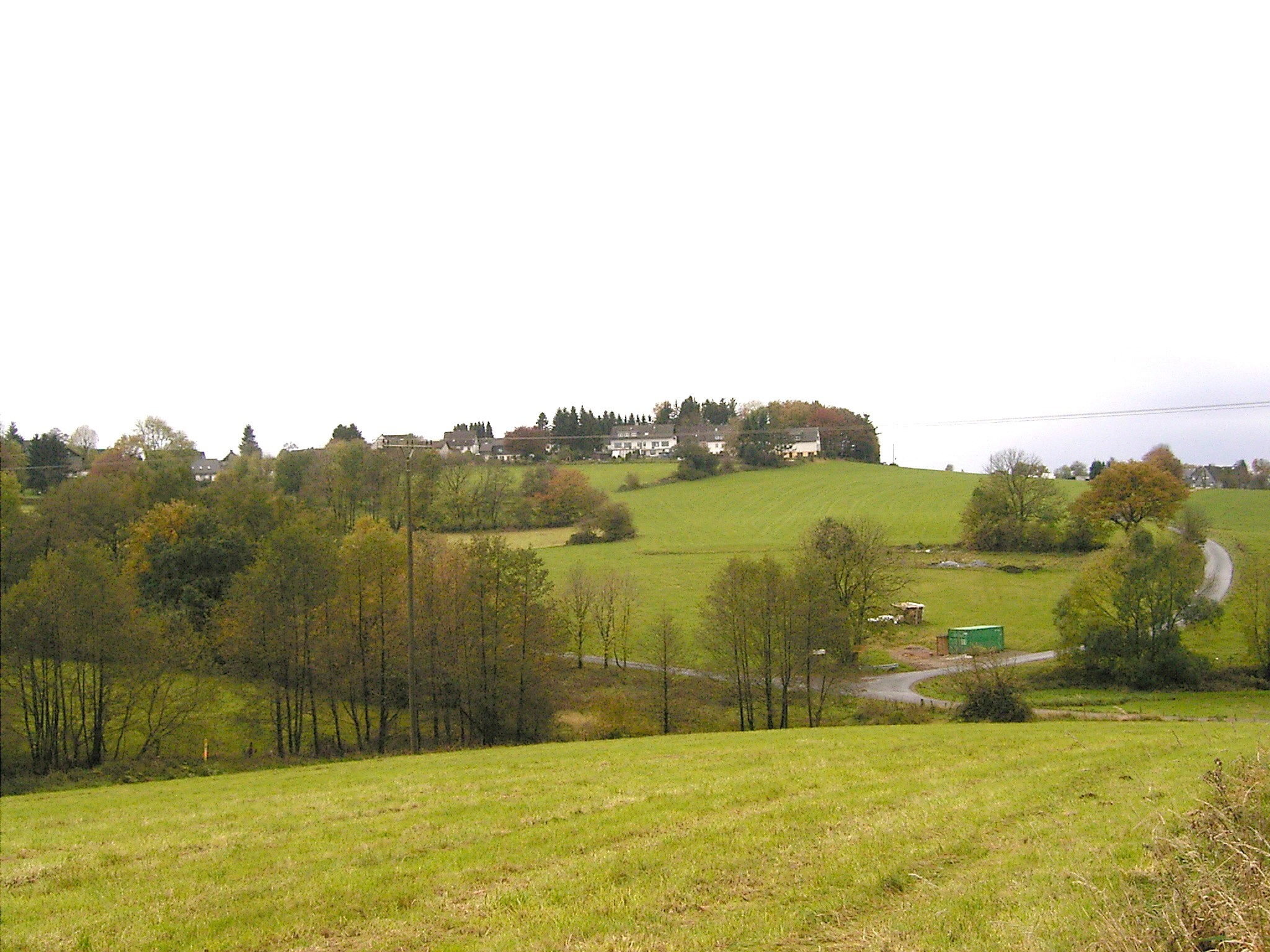 Radevormwald